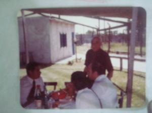 EL MAYOR PRESIDENTE DE LA HISTORIA DEL CLUB 50 AÑOS